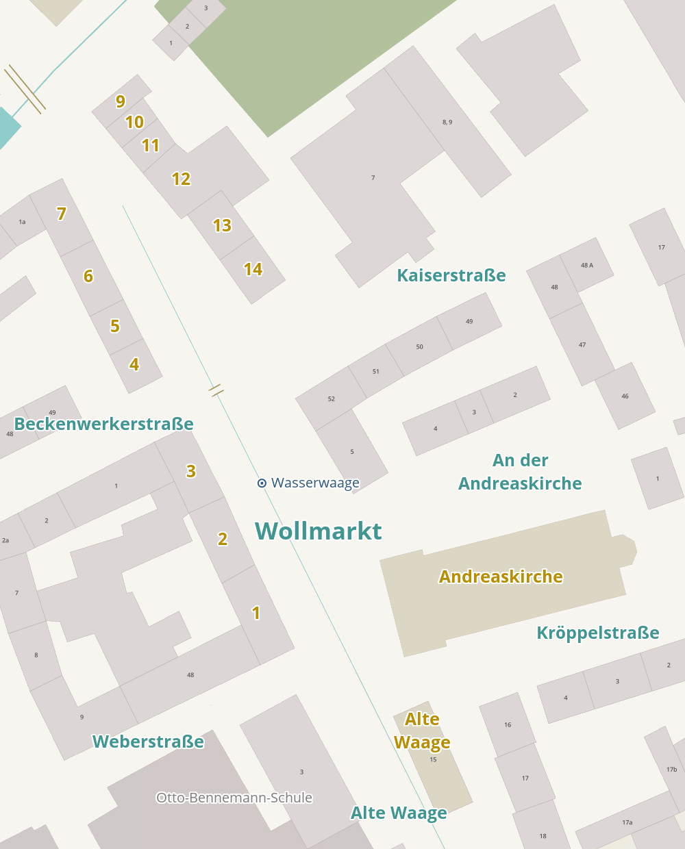 Plan des Wollmarktes in Braunschweig mit seinen Bauwerken. Die Kulturdenkmale sind gelblich eingezeichnet.